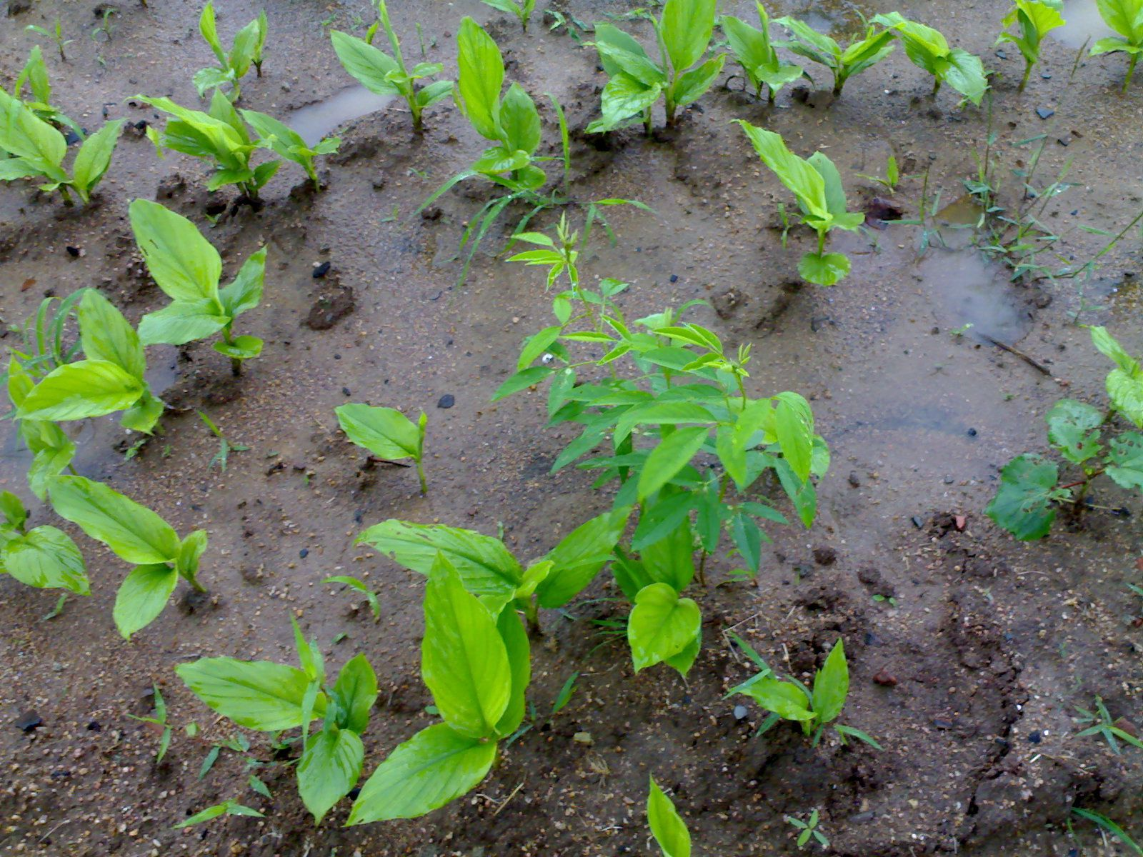 గ్రామంలో పసుపు పంట